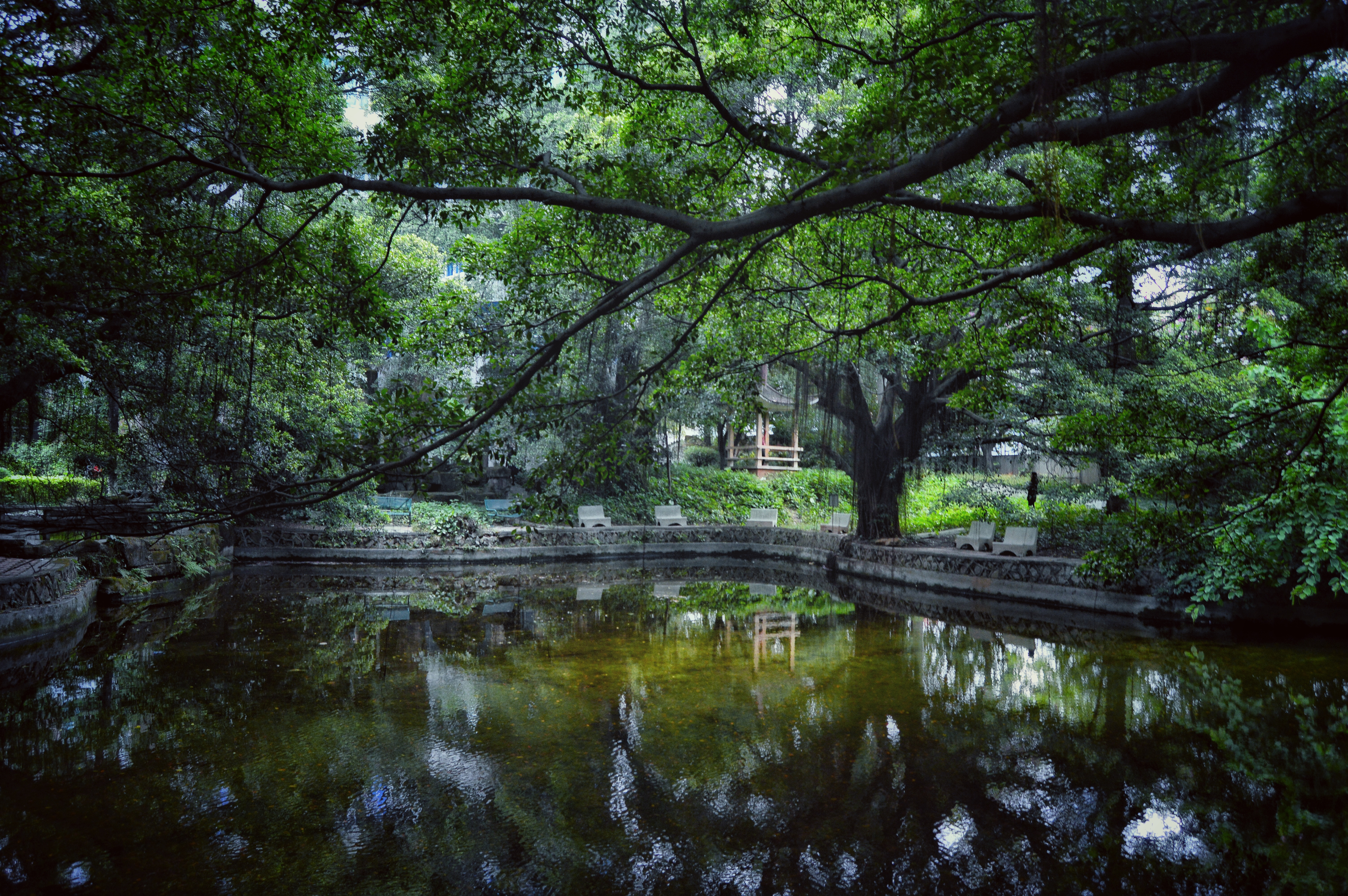 广二师海珠校区校内园林一景, 在校学生常在此驻足休息与学习